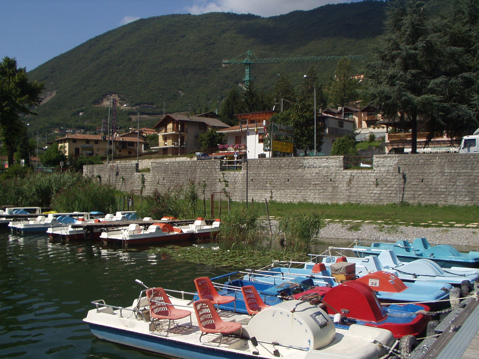 Ranzanico lago area turistica attrezzata con pedalò